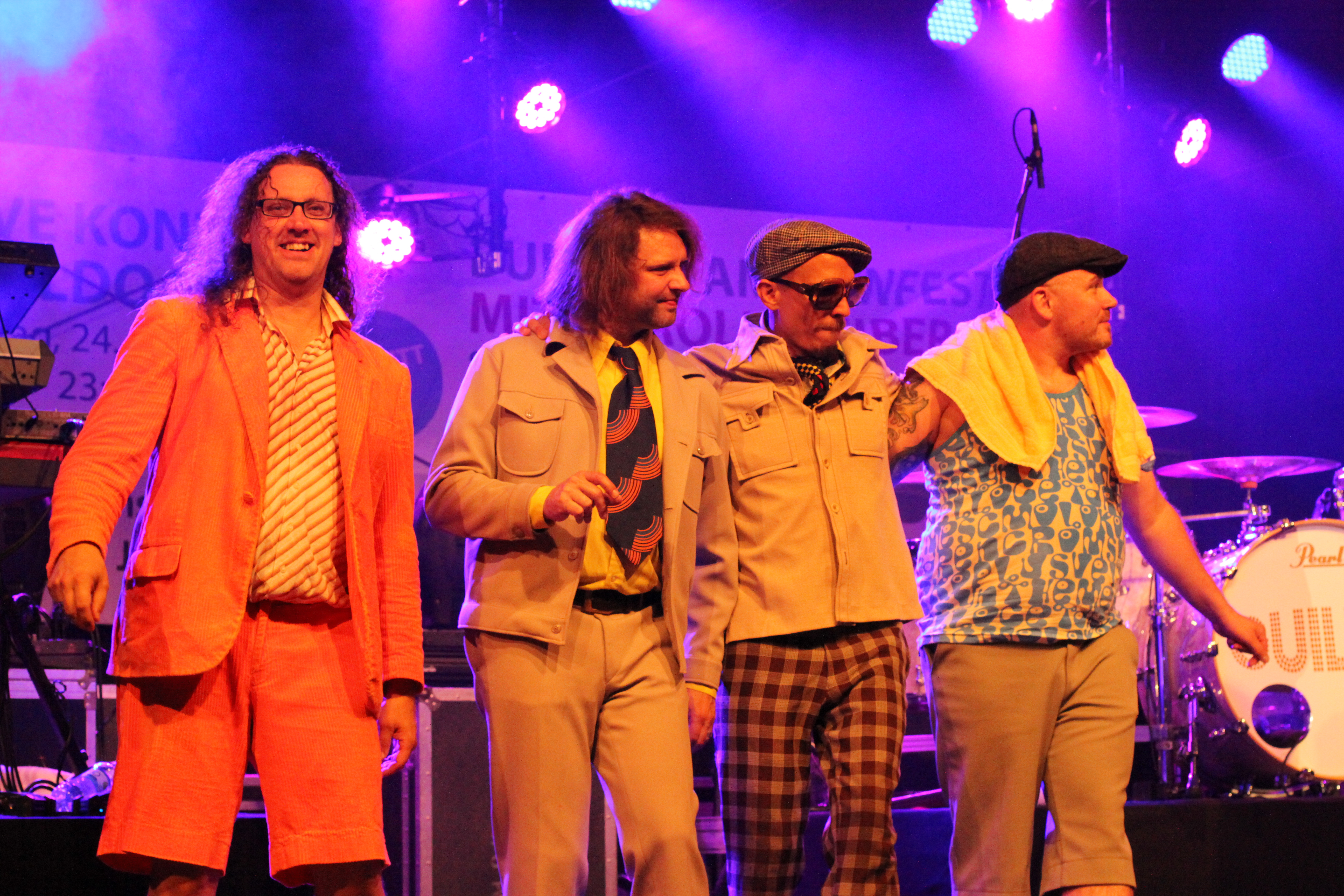 Guildo Horn trat am 24. Juli 2015 mit den Orthopädischen Strümpfen (Band) auf dem St.-Mang-Platz in Kempten. Anlass war das 50-jährige Jubiläum der Lebenshilfe Kempten